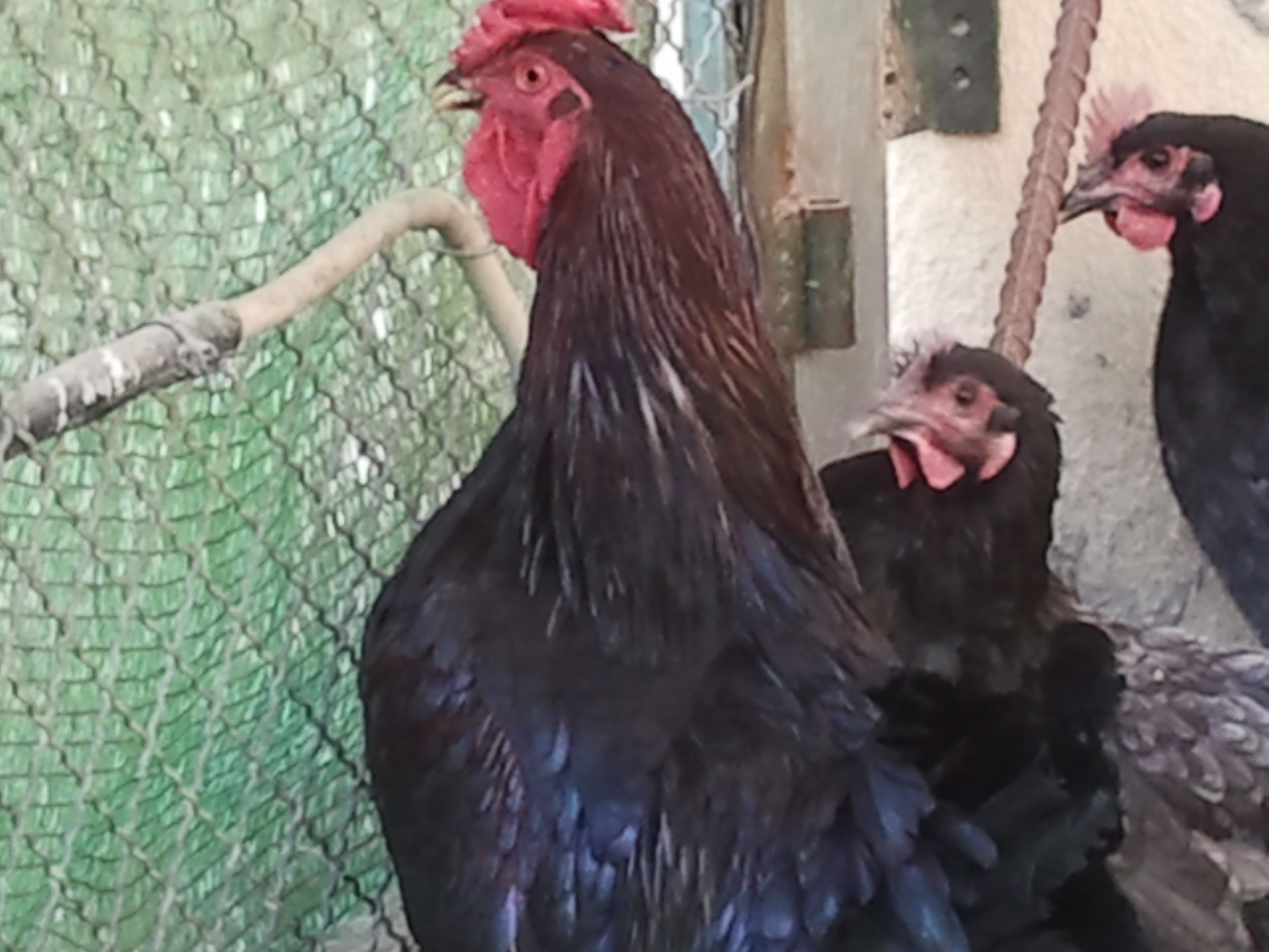 gallo serrano